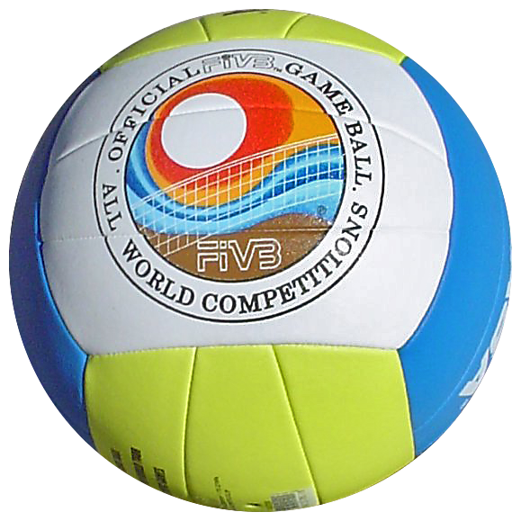 A Mikasa VLS200 beach volleyball ball.